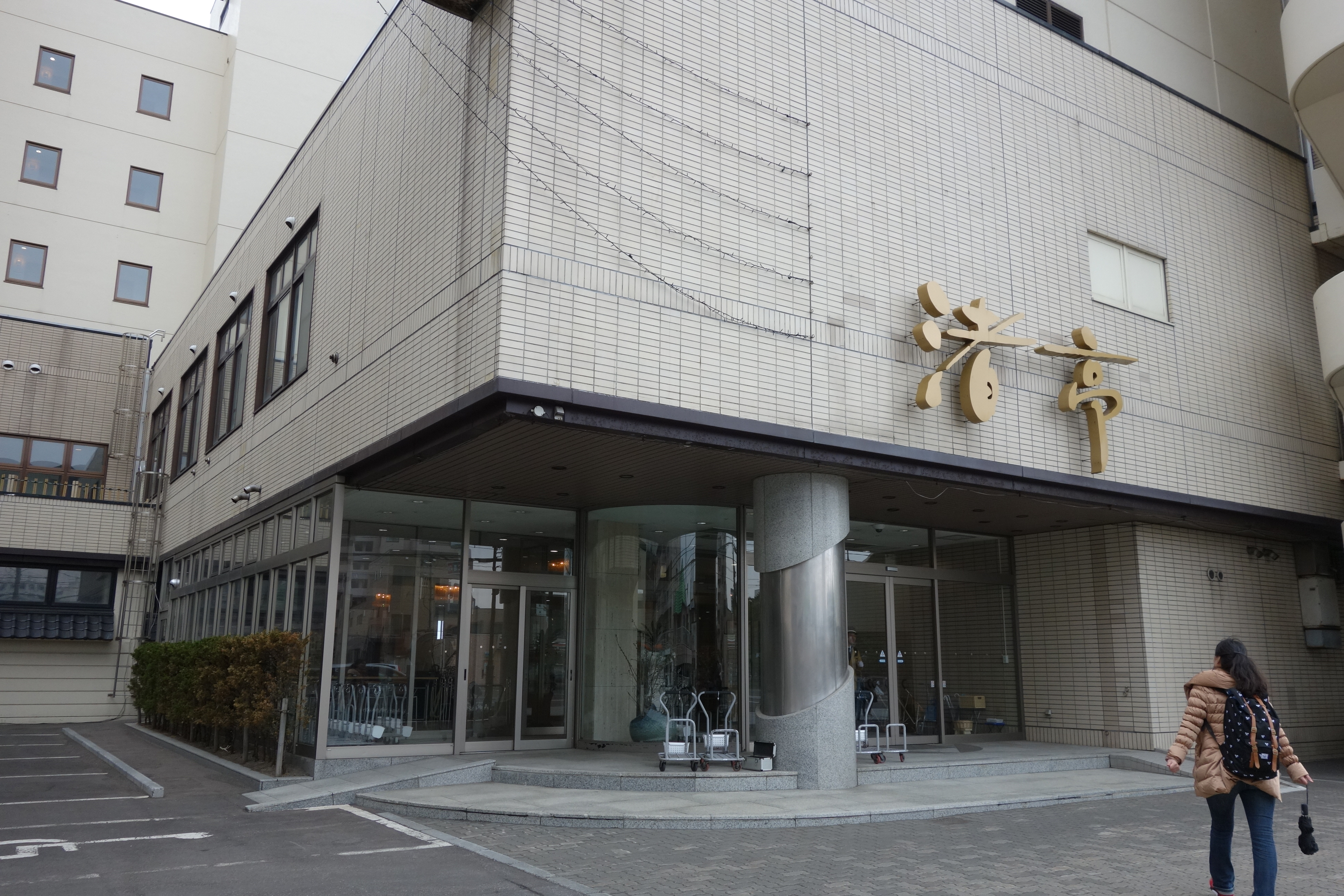 湯の川プリンスホテル 渚亭